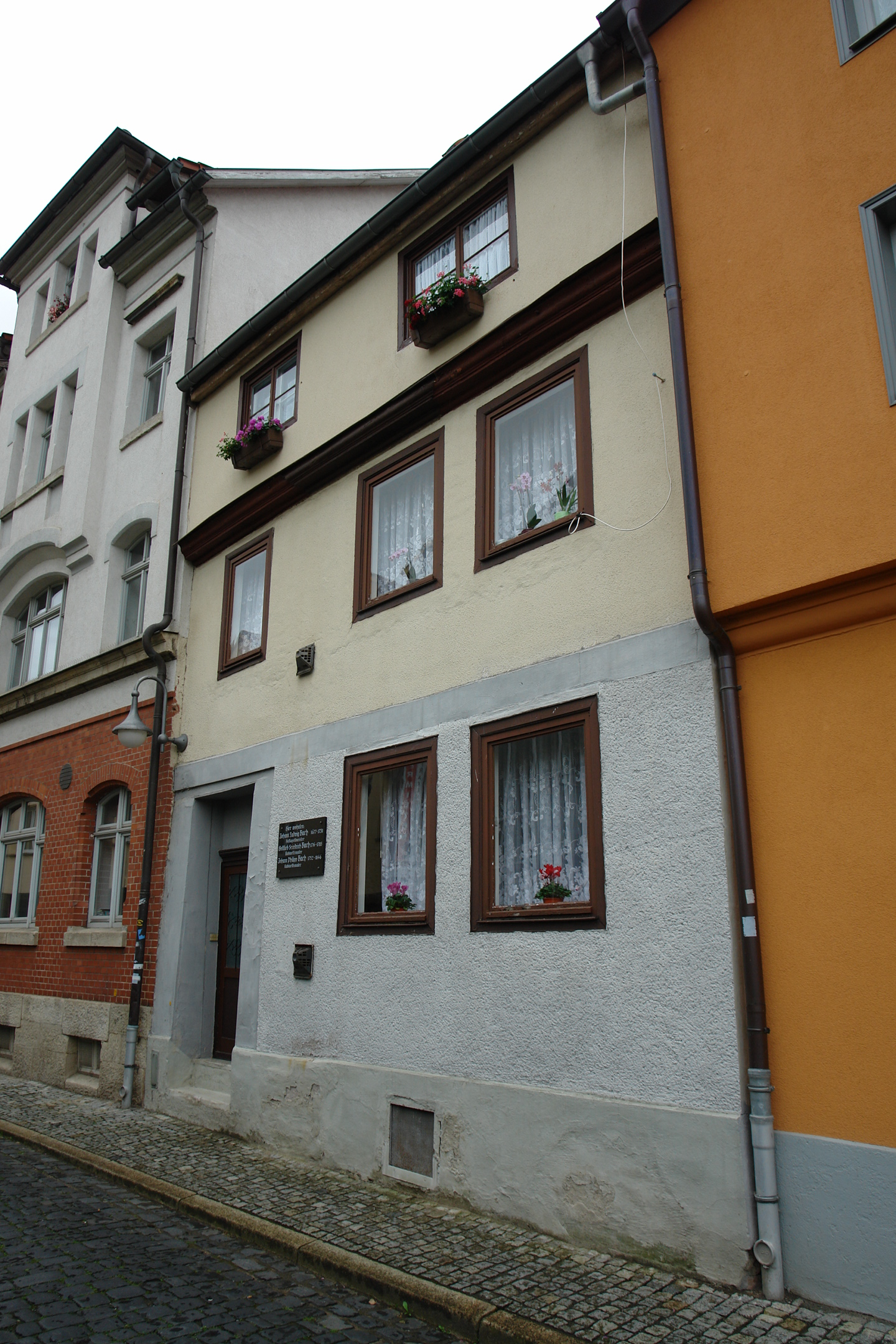 Bach-Haus in Meiningen